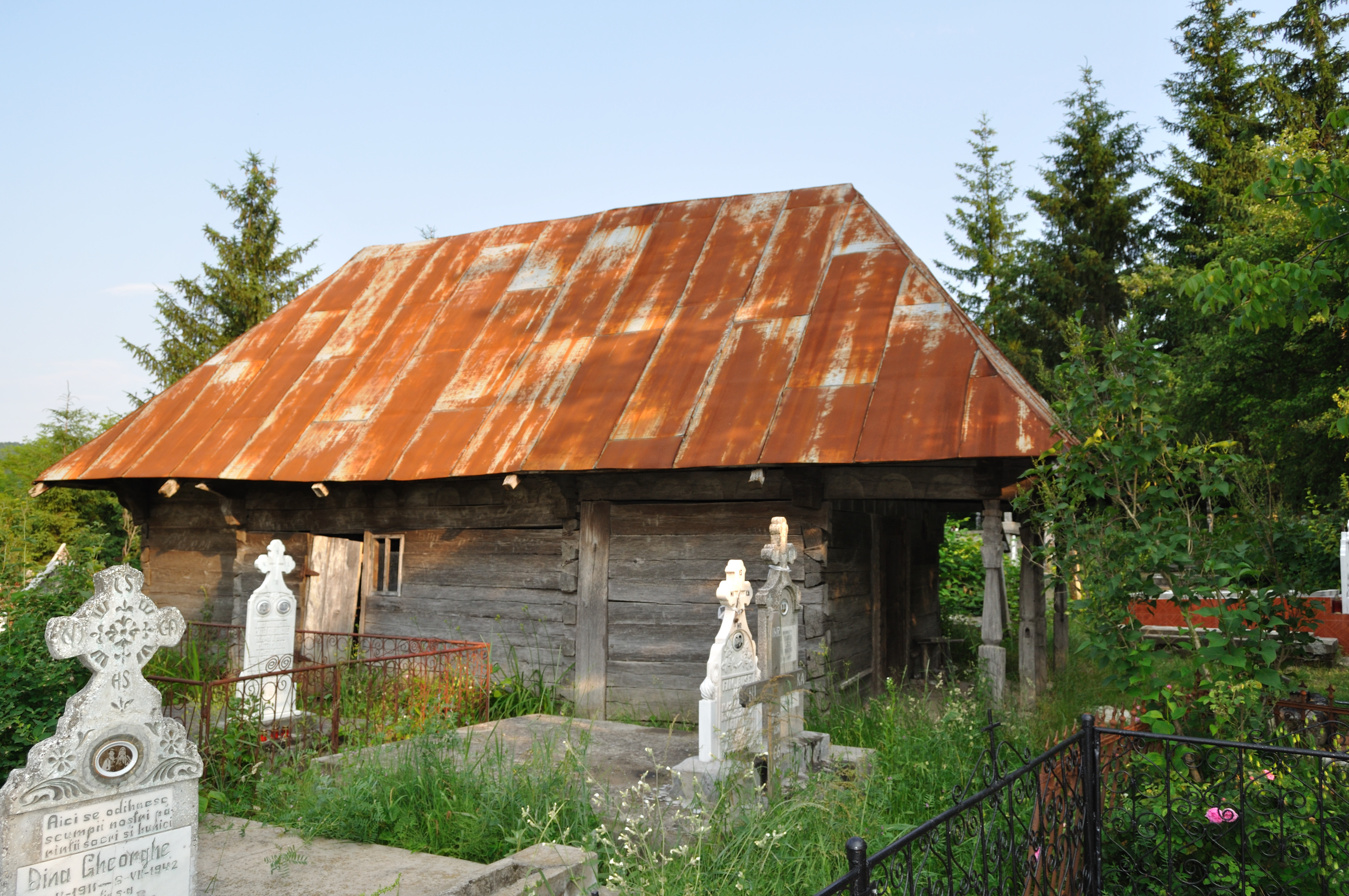 Biserica de lemn „Sf.Voievozi”, sat Pârâu Viu, cătun Glăveni, județul Gorj